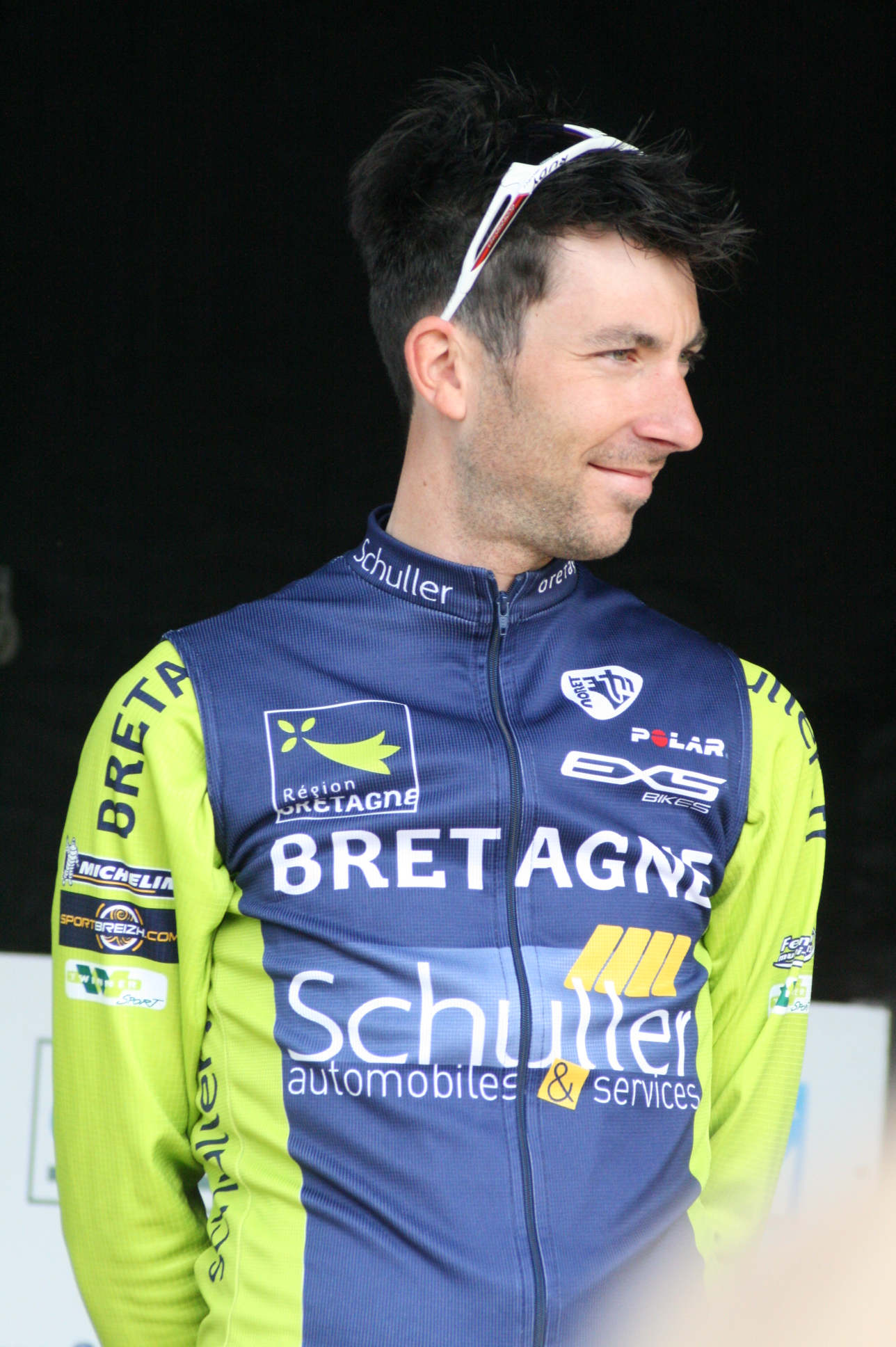 Sébastien Duret, lors de la présentation des équipes des 4 jours de Dunkerque 2010